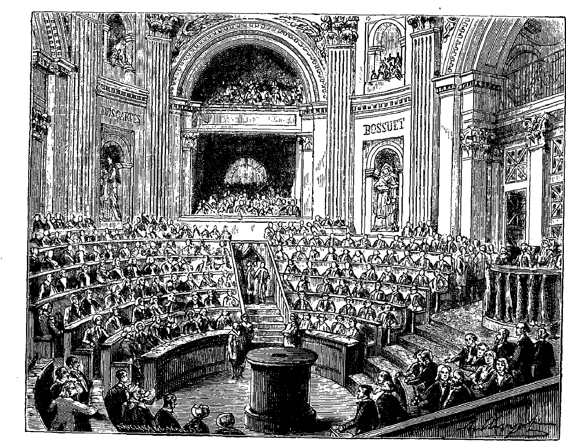 extrait de La France illustrée, géographie, histoire, administration, statistique, etc., tome I, par V.-A. Malte-Brun.